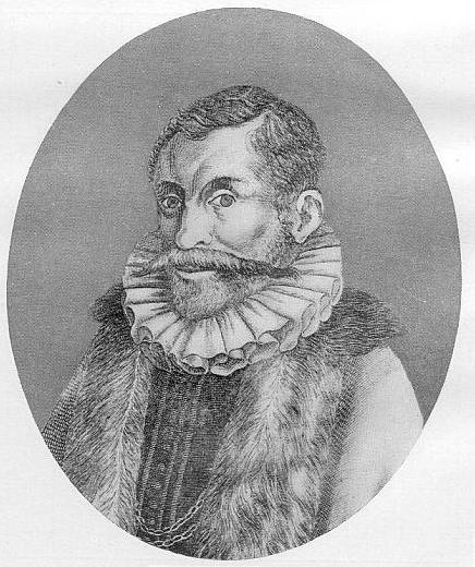 Janus Dousa (1545–1604), niederländischer Humanist. Stich von N. L'Armessin (aus Bibliotheca Belgica, 1739, I 546, Univ.-Bibl. München